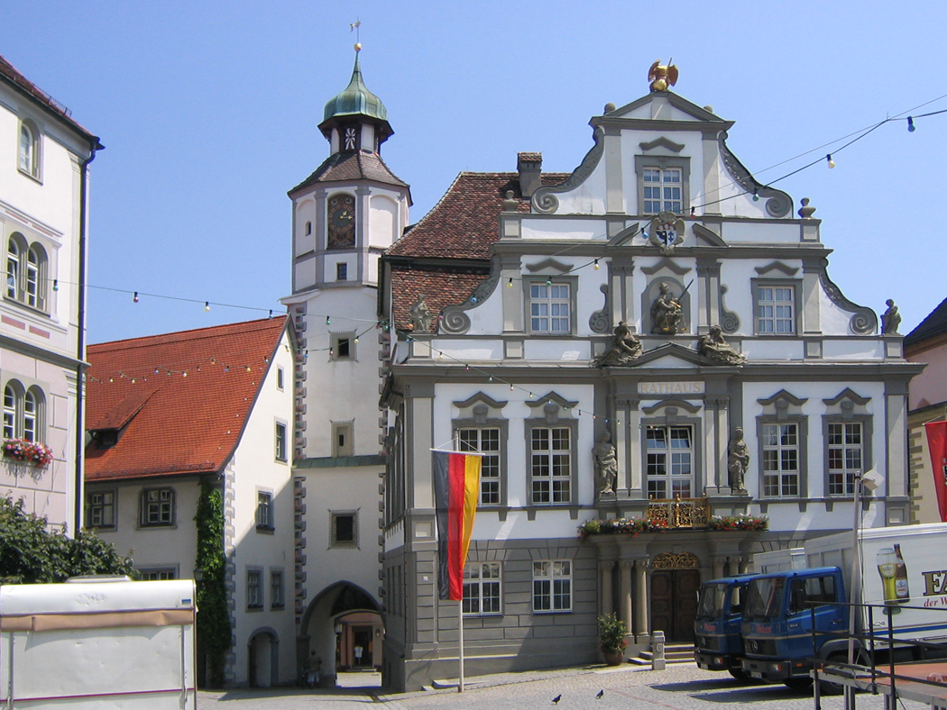 Rathaus, Fassade (1721) am Marktplatz, Wangen im Allgäu